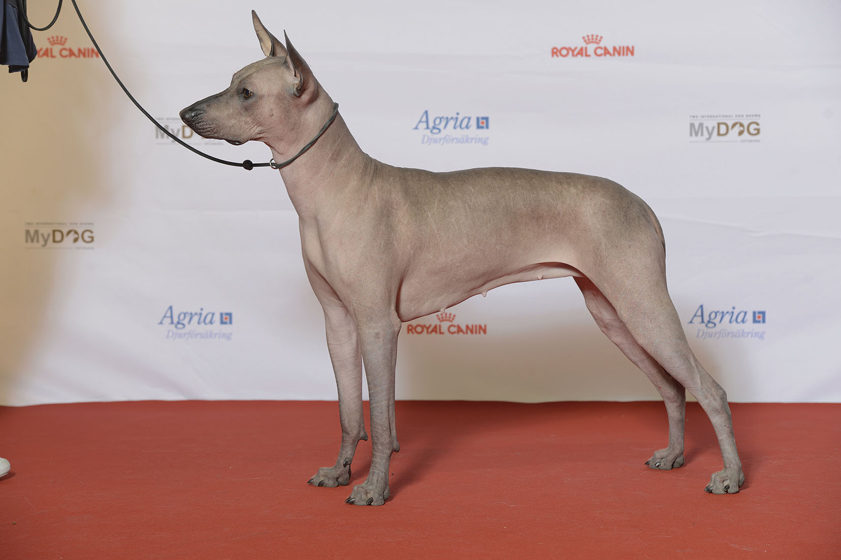 BIR Grupp 5 MEXIKANSK NAKENHUND Lokal Hero’s King Og Hart’s Istas MyDOG, Nordens största hundevenemang